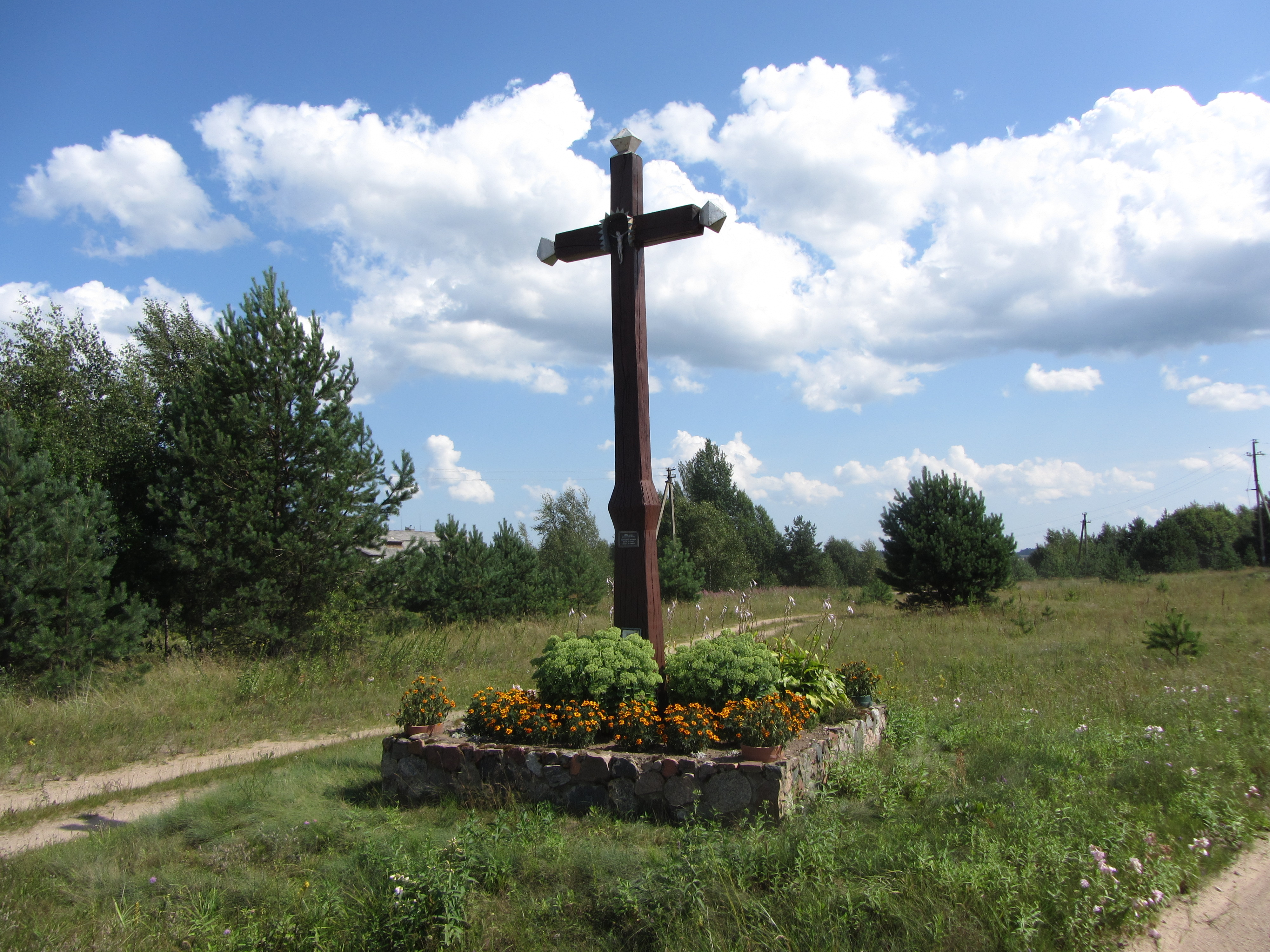 Mėžionys 18120, Lithuania